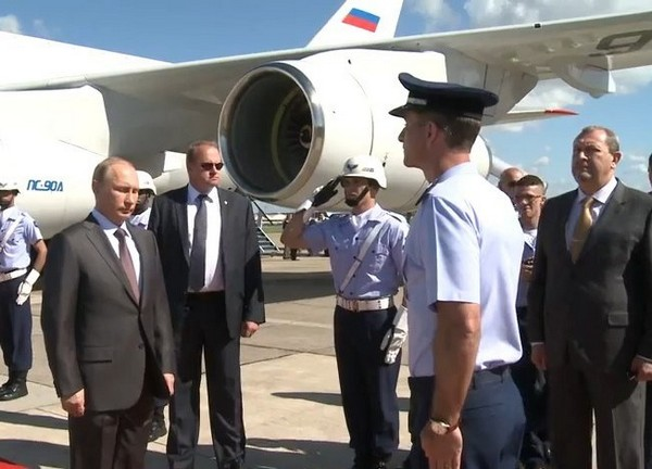 Прибытие Президента России В.В.Путина в Рио-де-Жанейро 13 июня 2014 г.